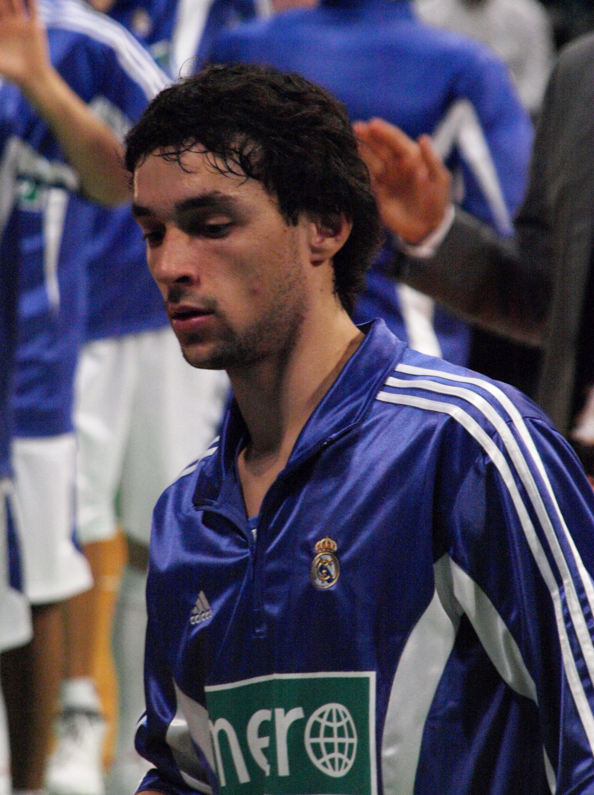 Sergio Llul en la rueda de calentamiento previa al partido que enfrentó al Real Madrid y al DKV Joventut en el pabellón Olímpico de Badalona en noviembre de 2008